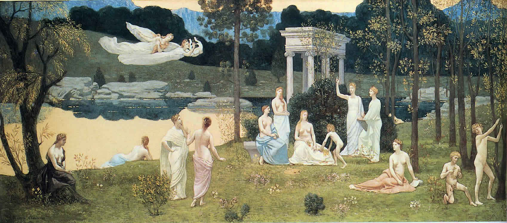 221 × 292 cm